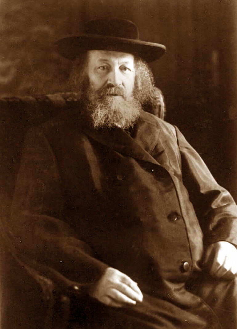 הרב יוסף צבי דושינסקי